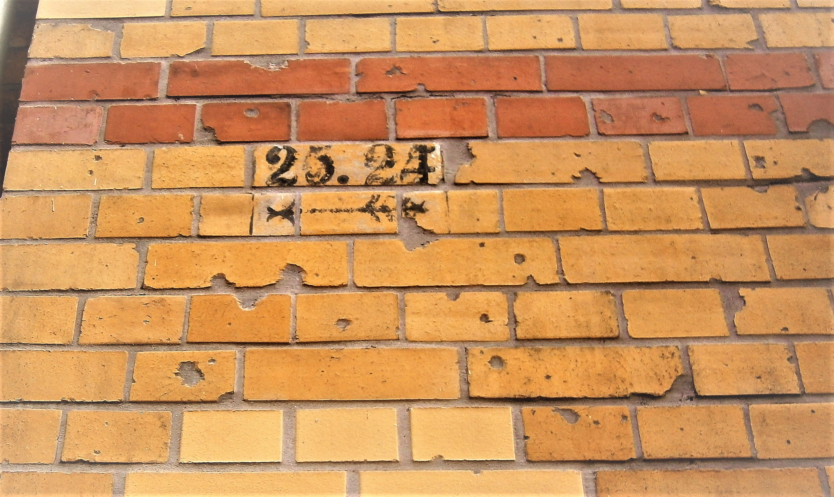 Die Marchlewskistraße ist eine Straße im Berliner Bezirk Friedrichshain-Kreuzberg, Ortsteil Friedrichshain. Angelegt und benannt wurde sie um 1870 auf dem Communicationsweg außerhalb der abgerissenen Berliner Zollmauer unter dem Namen Memeler Straße. Im Jahre 1950 erfolgte die Umbenennung in Marchlewskistraße. Schwere Schäden an der Bebauung bei Luftangriffen im Zweiten Weltkrieg brachten beim Neuaufbau Änderungen, jedoch der Straßenlauf blieb erhalten. Das Bild zeigt im Einzelnen: Die (noch erkennbare) Anzeige der Richtung der Hausnummern nach der alten Hufeisennummerierung am Haus Marchlewskistraße 45.